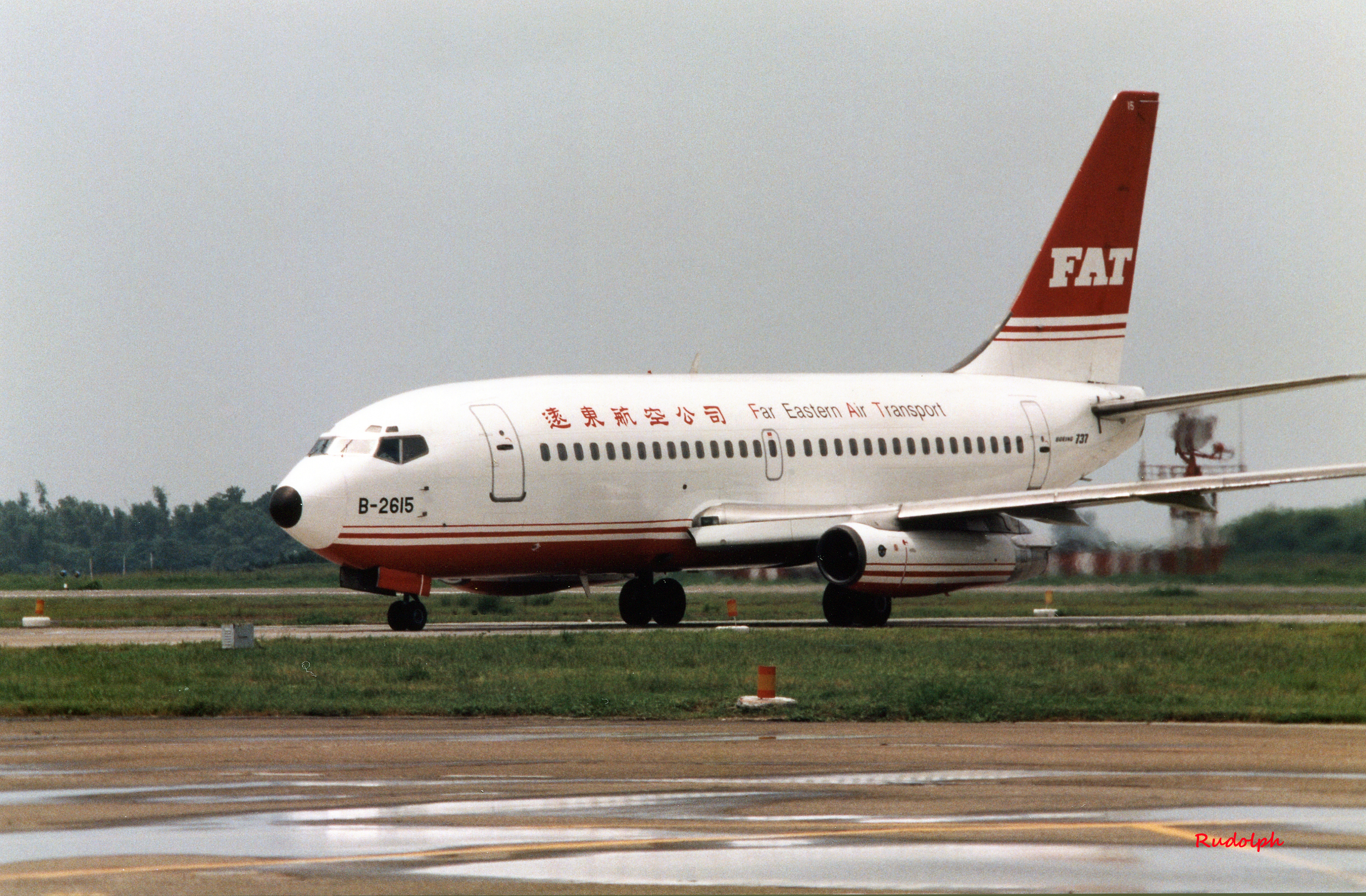 遠東航空已退役之波音737-200機號B-2615於臺南機場，攝於1990年代後期。